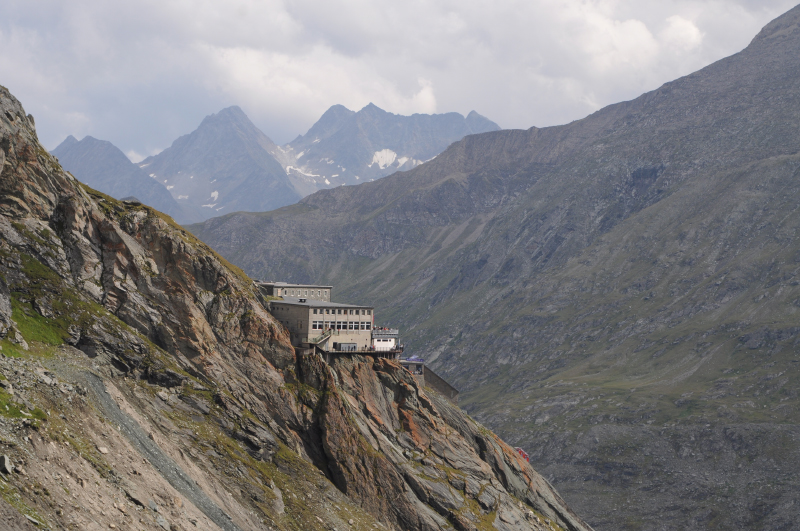 Blick vom Gamsgrubenweg auf die Kaiser-Franz-Joseph-Höhe